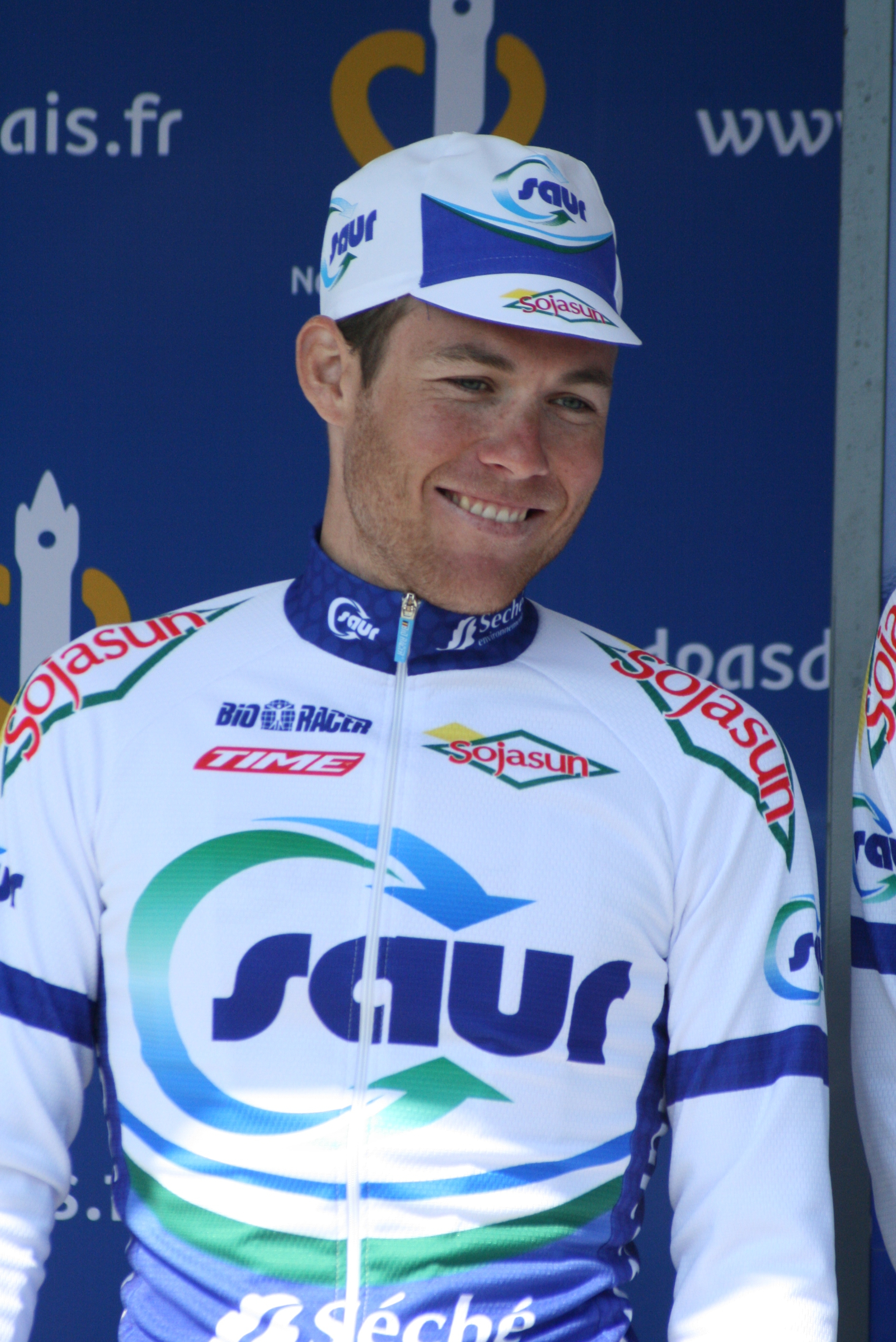 Présentation des coureurs au départ de la première étape Cyril Bessy